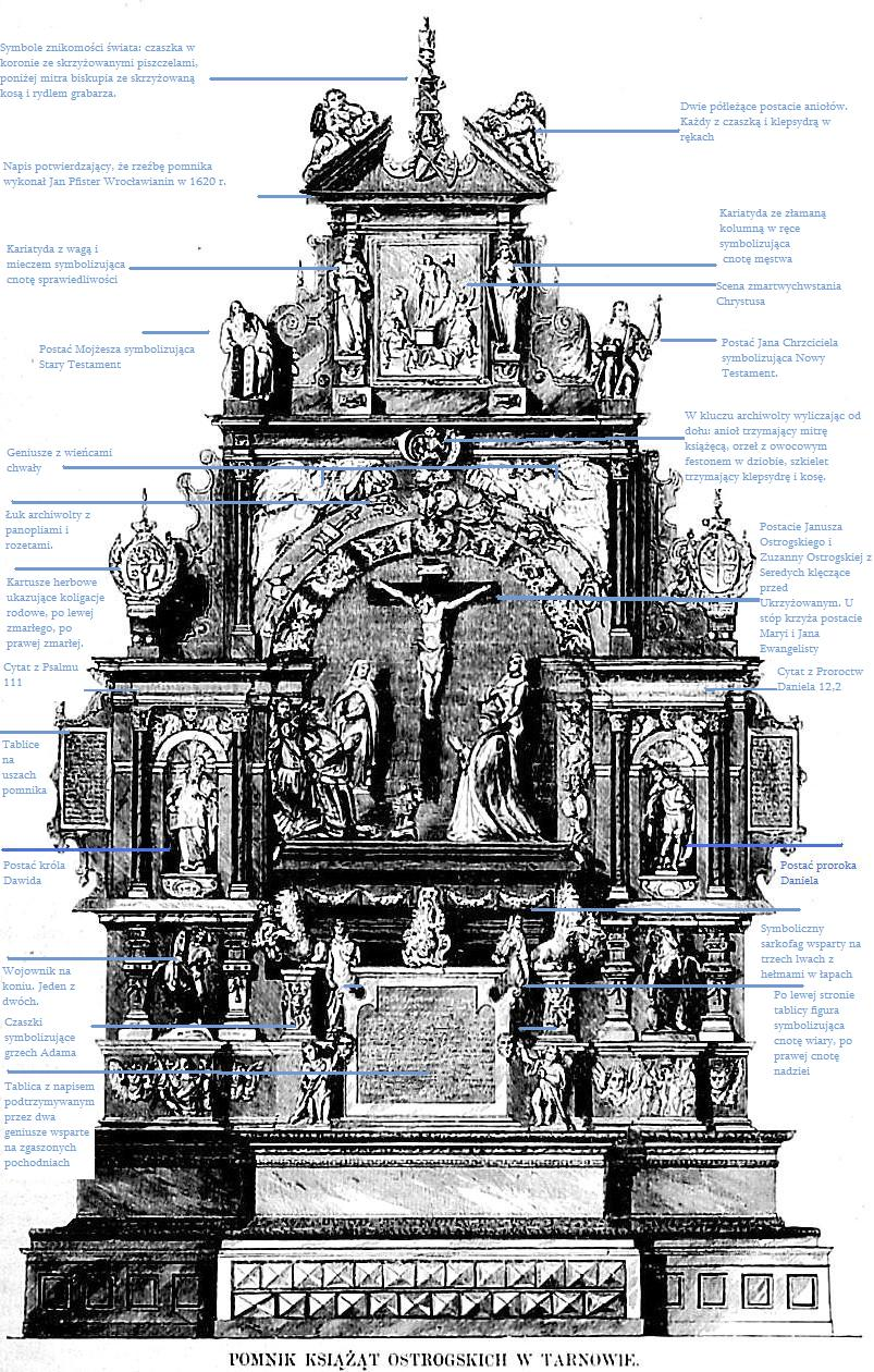 Symbolika pomnika Ostrogskich w Bazylice Katedralnej w Tarnowie